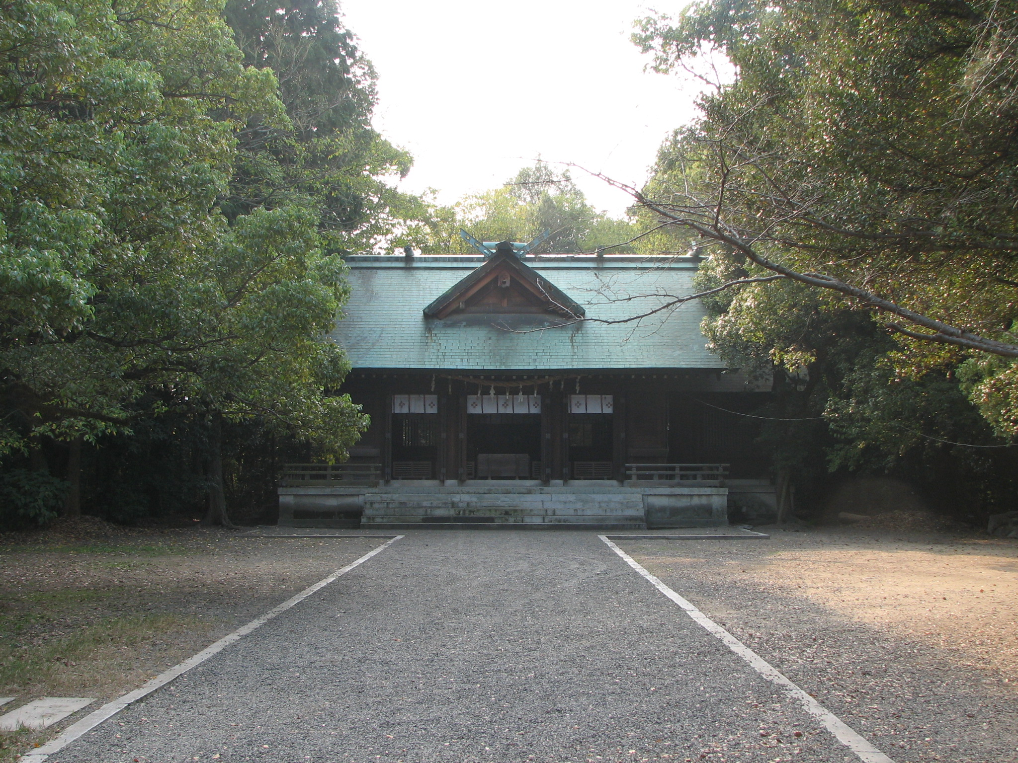 Nogi-jinja in Kagawaken-gokoku-jinja, Zentsuji, Kagawa, Japan 香川縣護國神社（香川県善通寺市）内 乃木神社